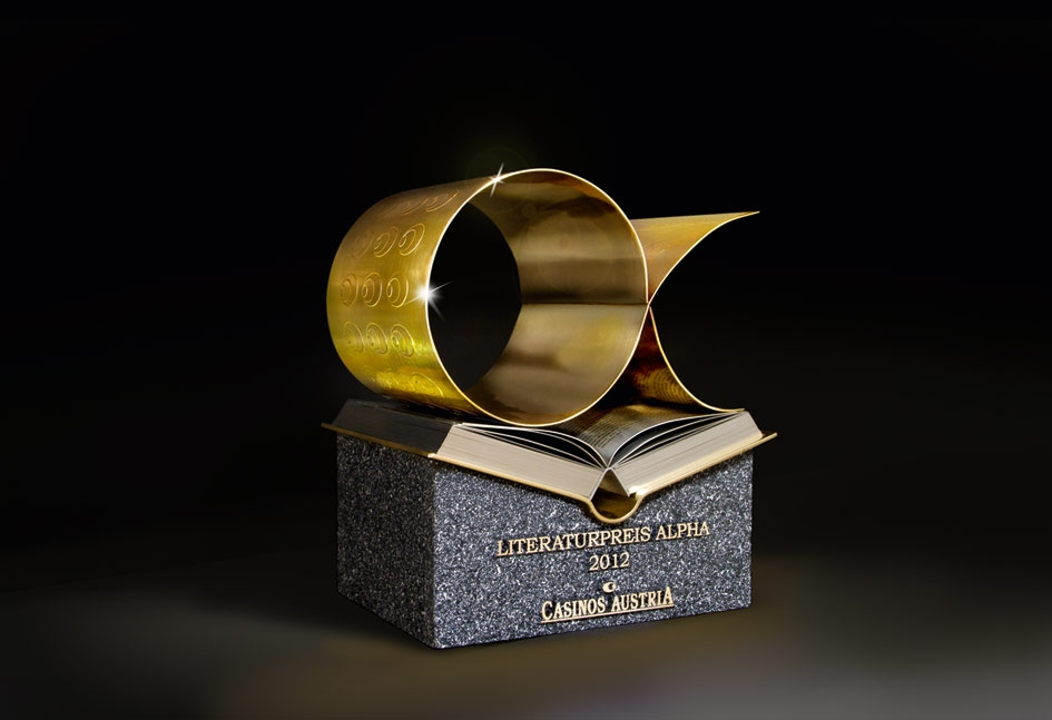 Der Alpha Literaturpreis wird einmal pro Jahr vergeben.